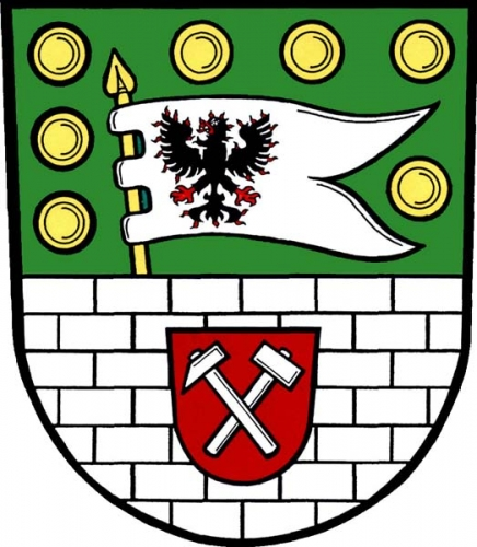 znak, Předín, okres Třebíč